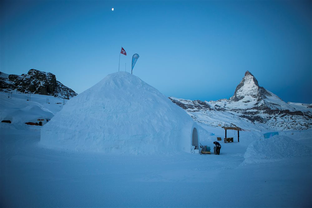 Iglu-Weltrekord 2016 in Zermatt